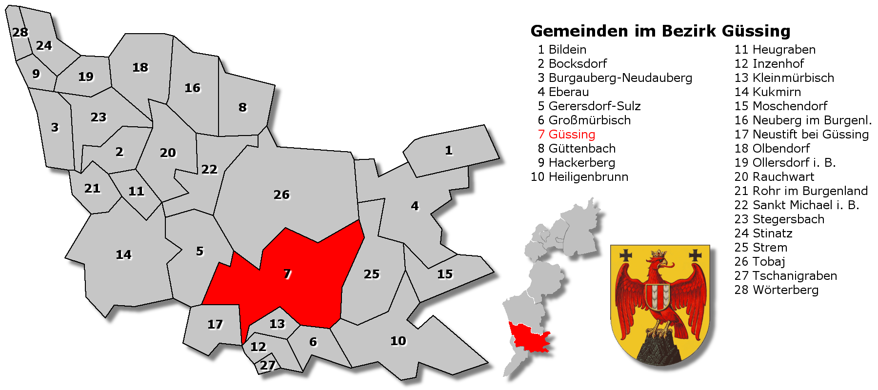 Gemeindekarte Bezirk Güssing (Burgenland, Österreich)